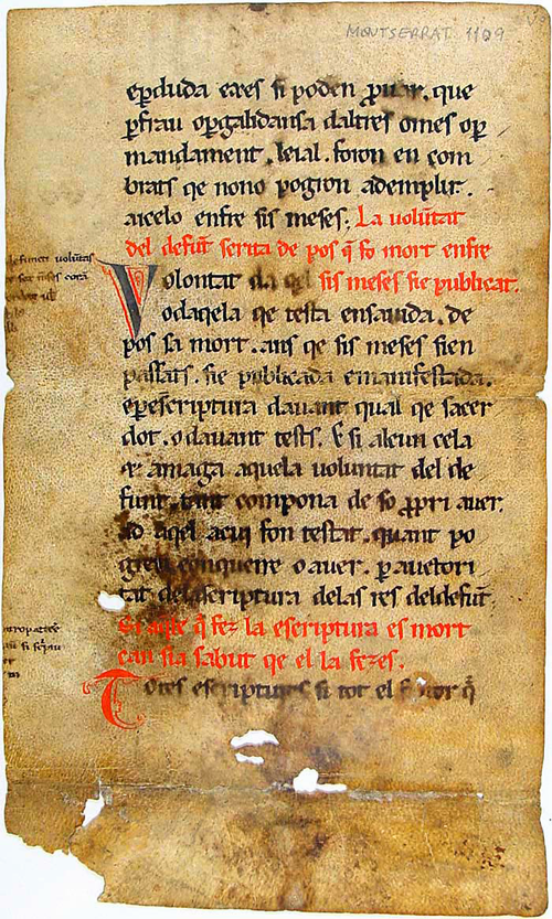 Fragment d'una versió catalana del Liber Iudiciorum visigòtic,reproducció digital del manuscrit de la Biblioteca de l'Abadia de Montserrat, Ms. 1109